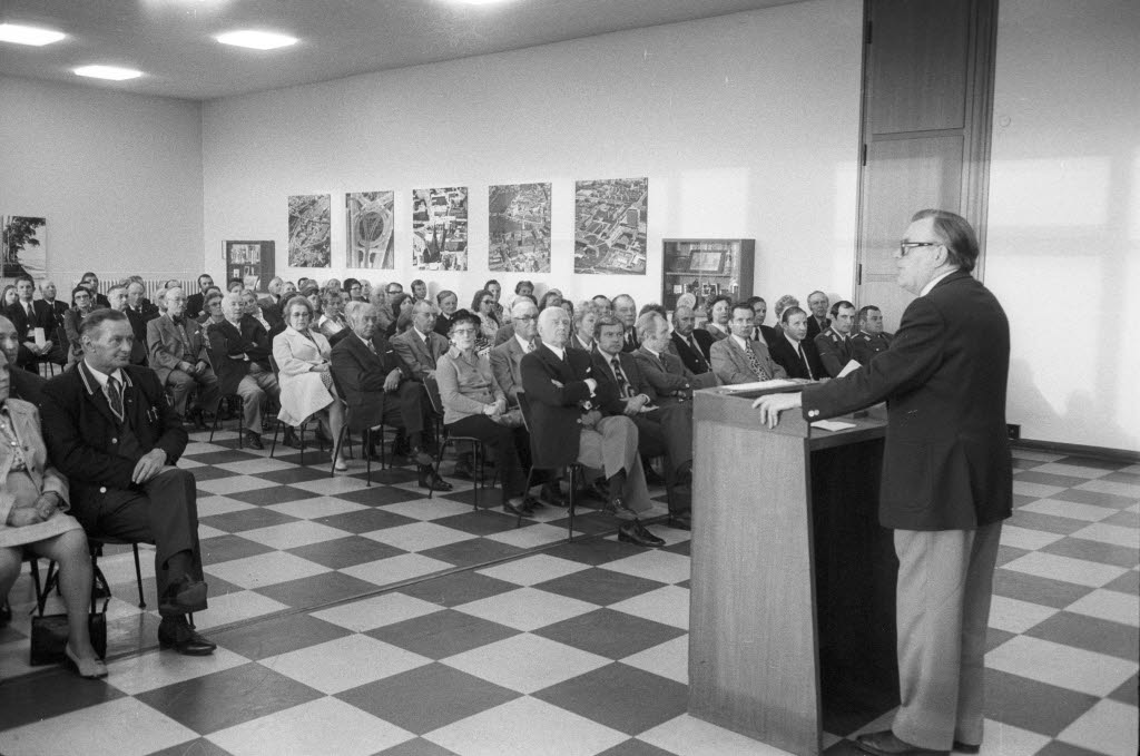 In den Räumen der Kieler Verkehrsaktiengesellschaft (KVAG) an der Werftstraße werden über 100 Männer, darunter viele Berufskraftfahrer, von der Landesverkehrswacht als "bewährte Kraftfahrer" ausgezeichnet. An der Auszeichnung nimmt auch Stadtpräsident Eckhard Sauerbaum (vordere rechte Reihe, 2. v.l.) teil.